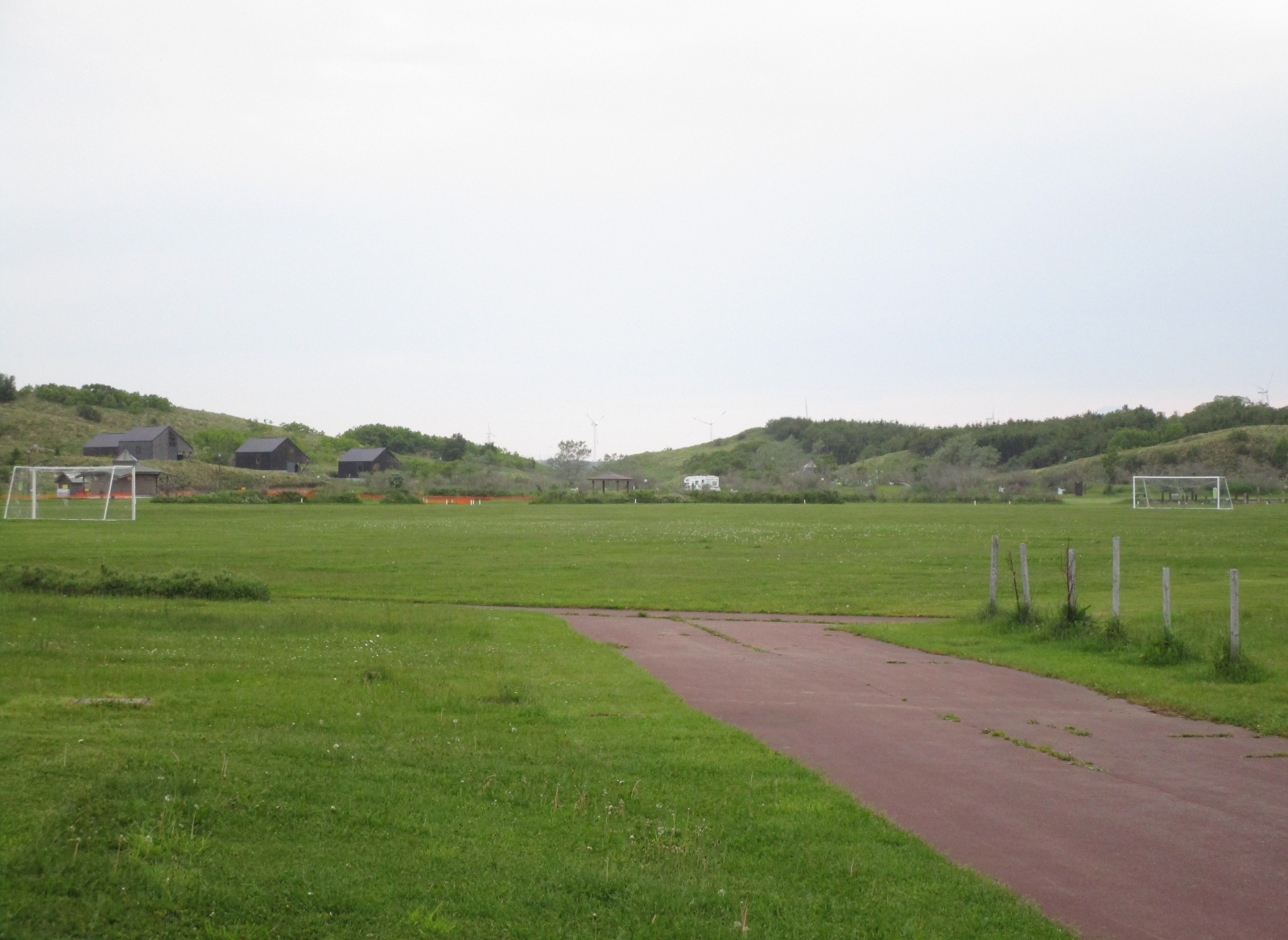 北海道立宗谷ふれあい公園 多目的広場